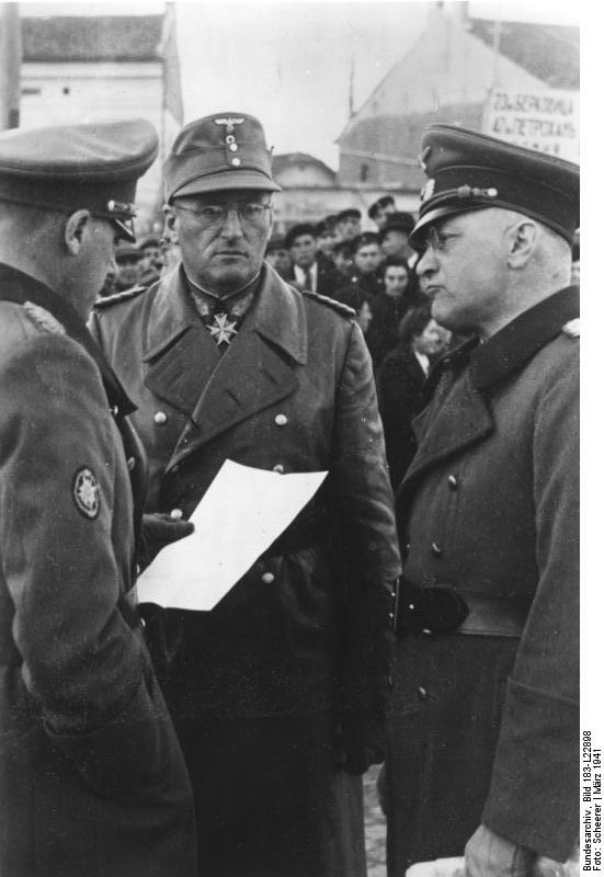 Vormarsch in Bulgarien: Während einer Marschpause. März 1941 PK-Scheerer Scher-Bilderdienst 2604-41